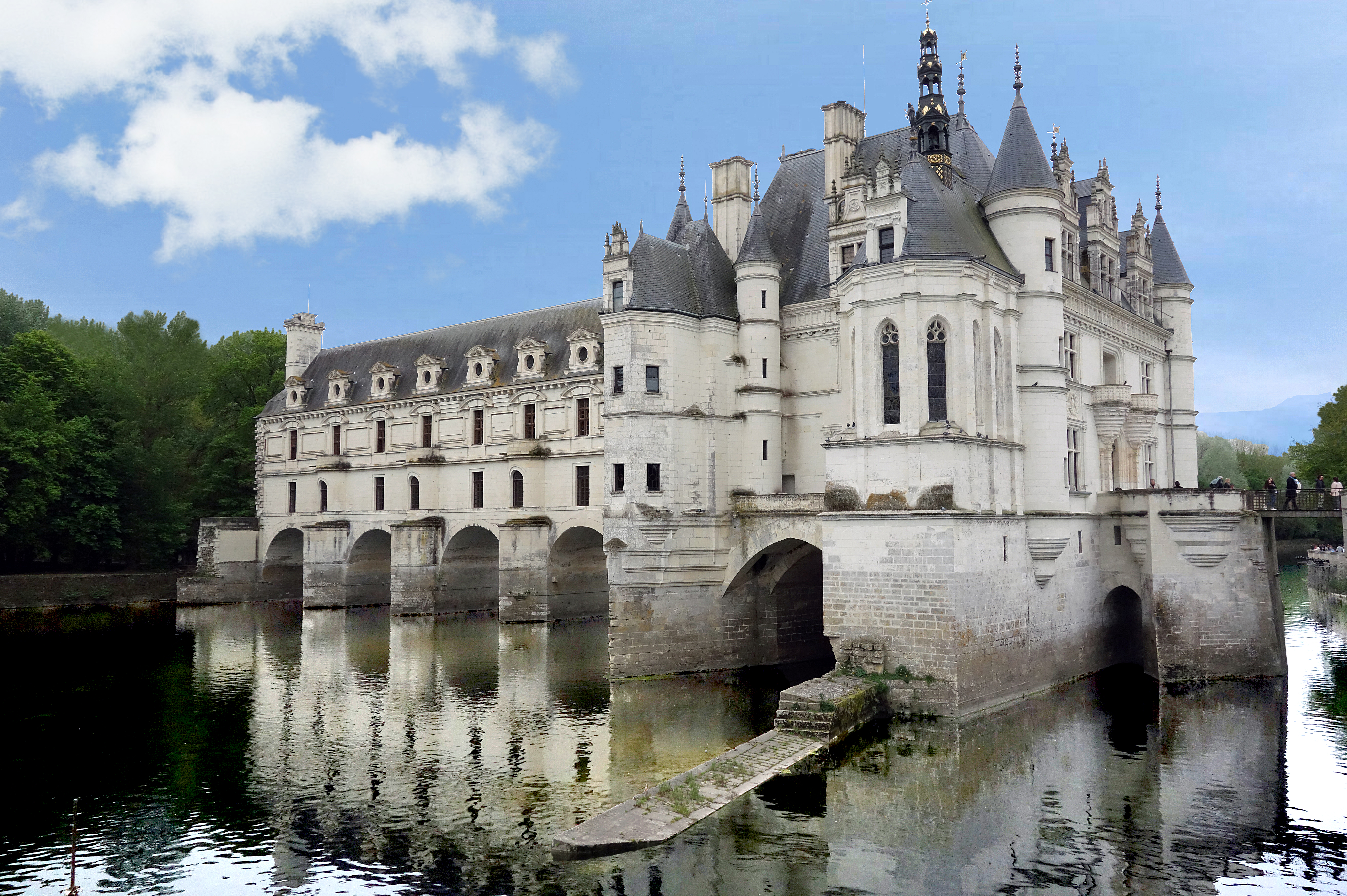 Vue du Château de Chenonceau .